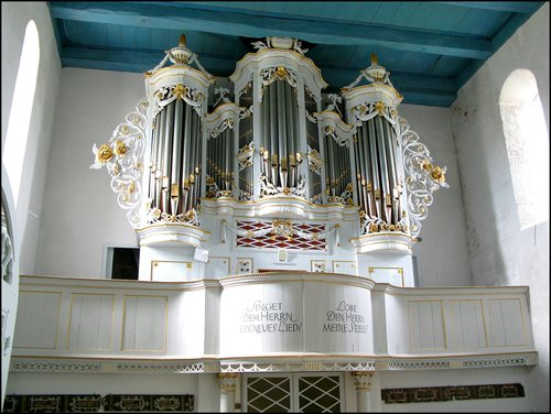 Orgel in Wiarden